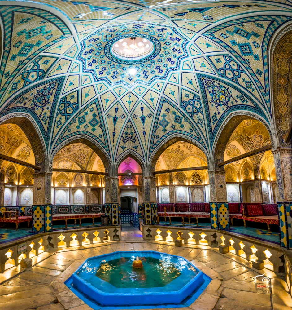 حمام سلطان امیراحمد